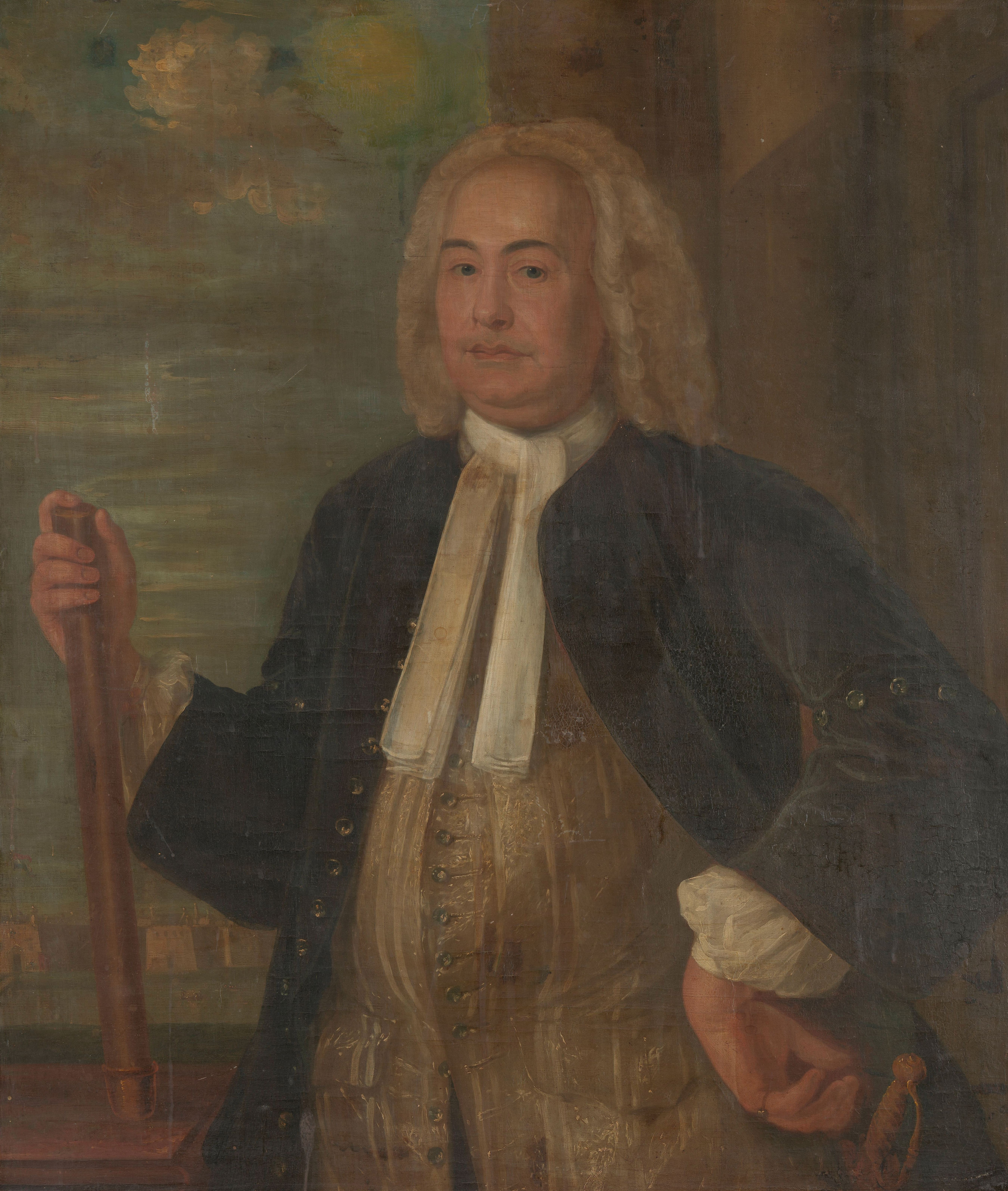 Portret van Johannes Thedens (1680-1748). Gouverneur-generaal (1741-43). Staande, ten halven lijve, commandostaf in de rechterhand, de linkerhand in de zij. Op de achtergrond een gezicht op het kasteel van Batavia. Onderdeel van een reeks van portretten van de gouverneurs-generaal van het voormalige Nederlands Oost-Indië. Collection: schilderijen; Gouverneurs-generaal serie